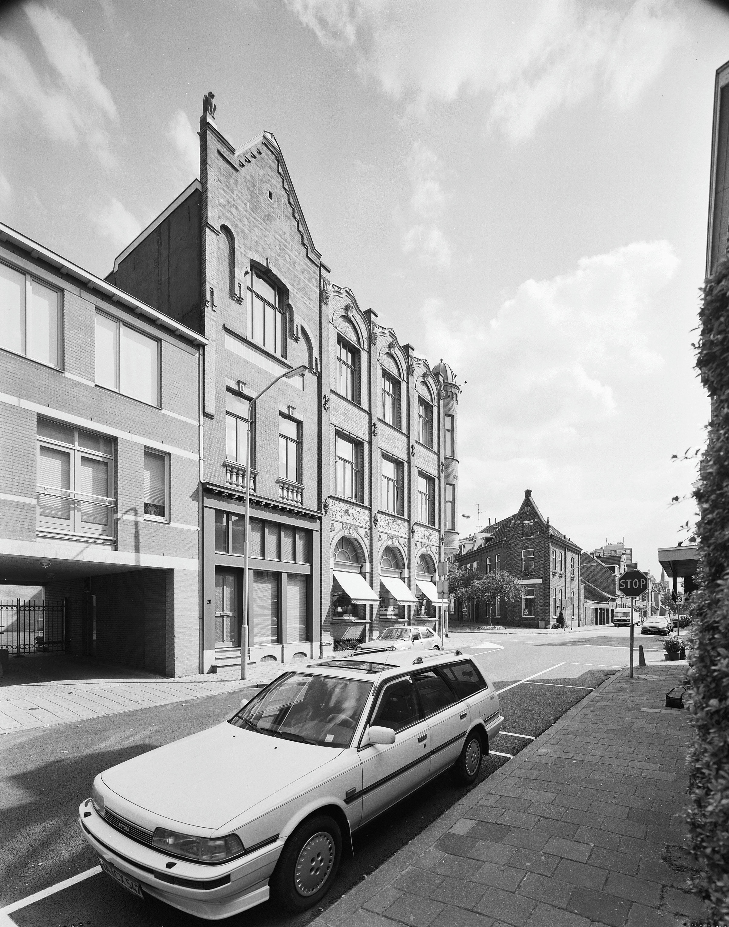 Overzicht voorgevels